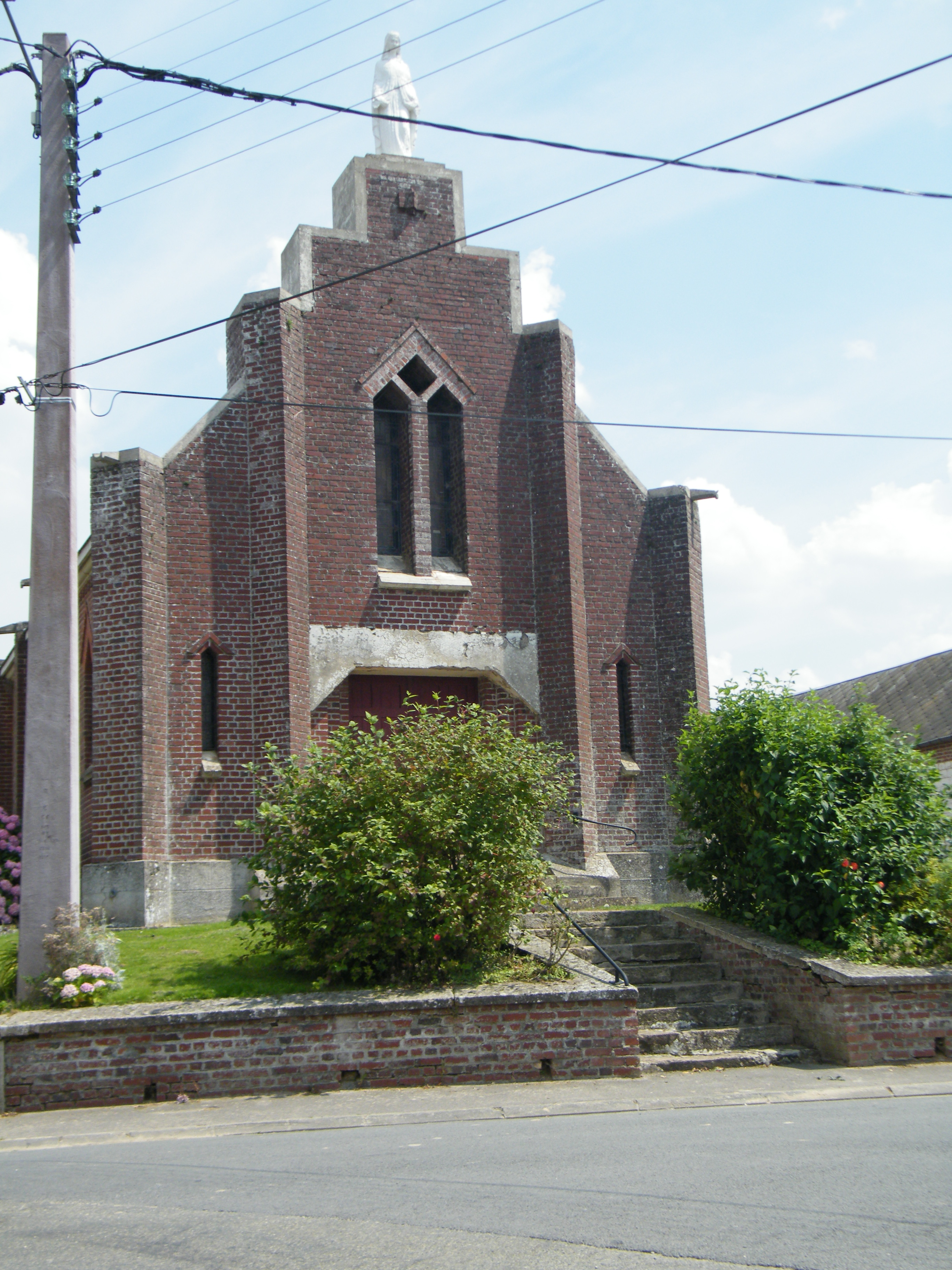 église.